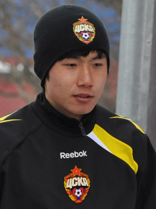 Ким Ин Сон